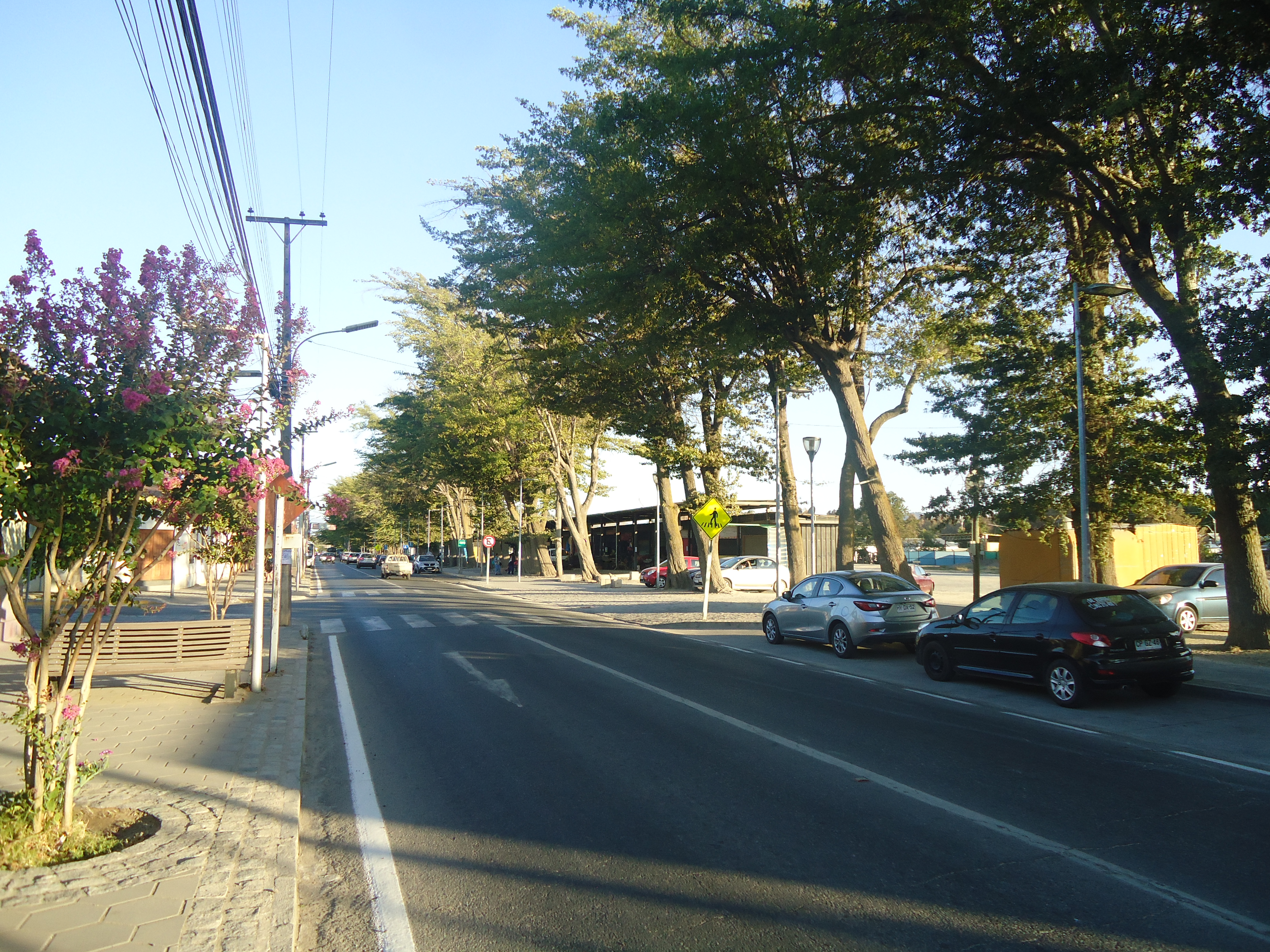 Vista de la ruta CH-90, en su paso por el centro de la localidad de Peralillo